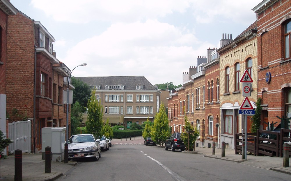 avenue de la Sablière Auderghem Belgium